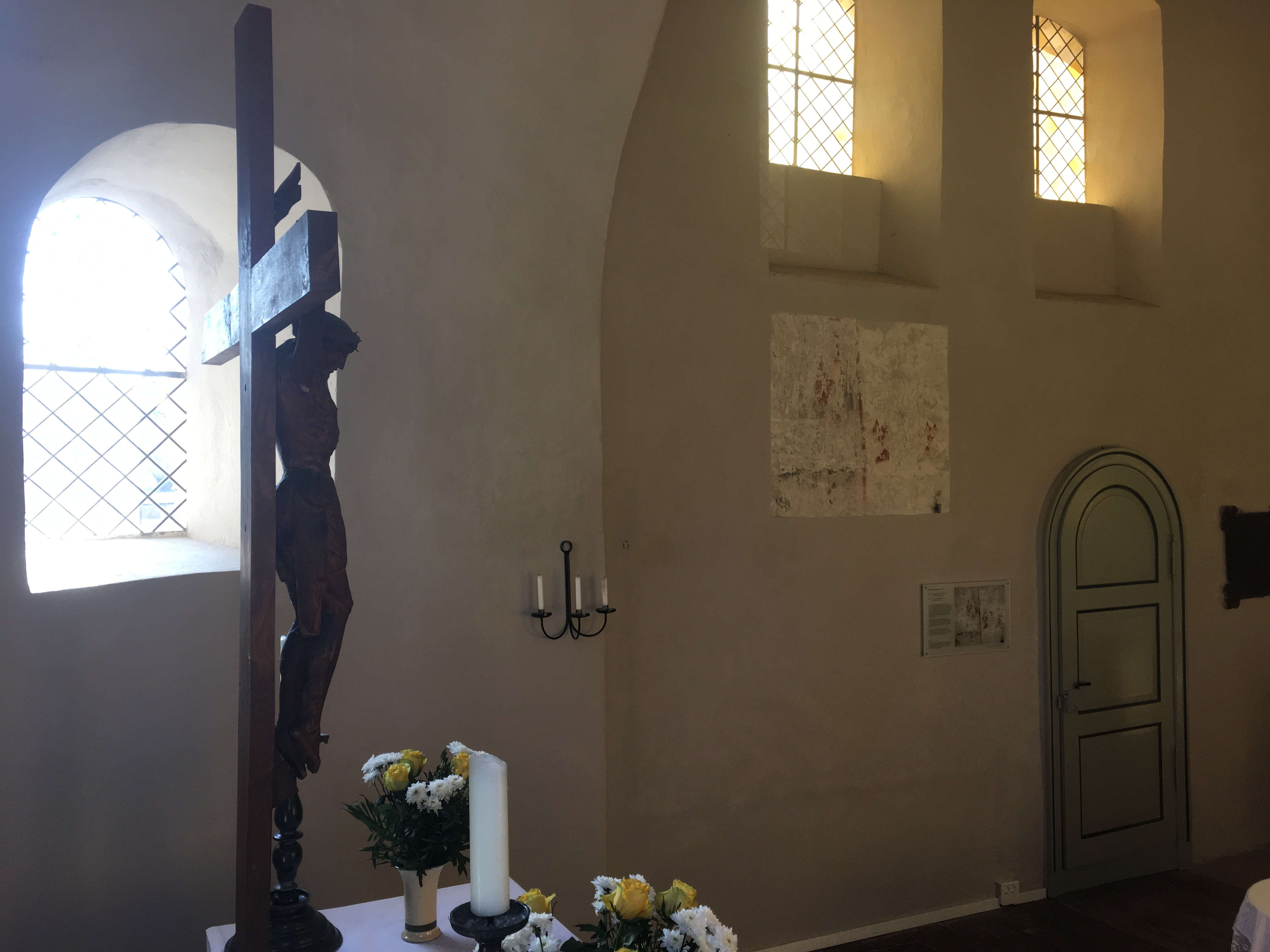 Die Dorfkirche Wittbrietzen der Stadt Beelitz im Land Brandenburg ist eine spätromanische Feldsteinkirche, die in den Jahren 1226 bis 1250 erbaut wurde.